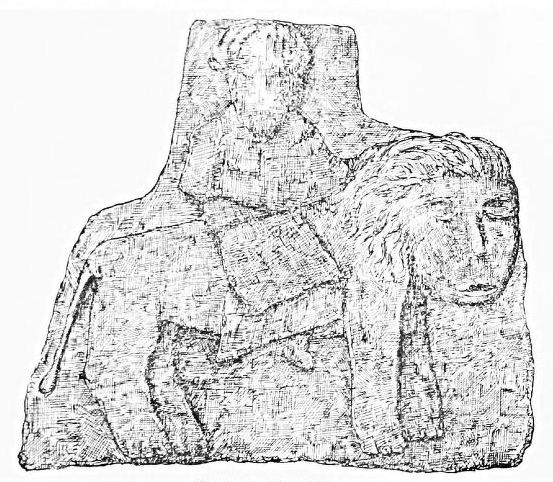 Kuskwam תבליט אריה